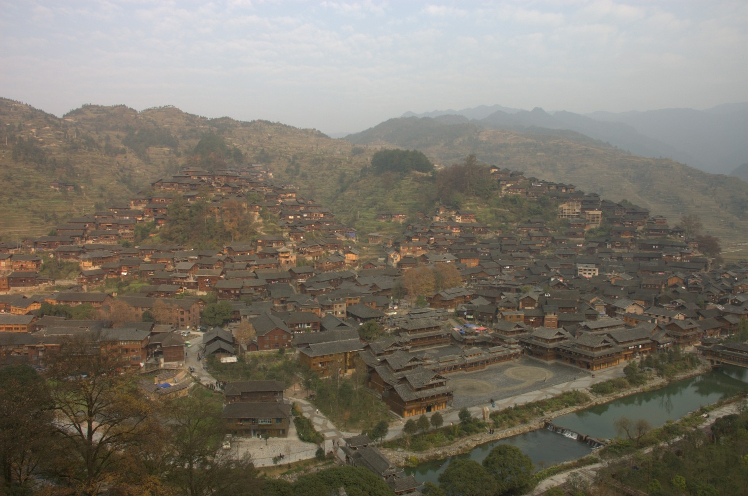 贵州 黔东南自治州 西江千户苗寨